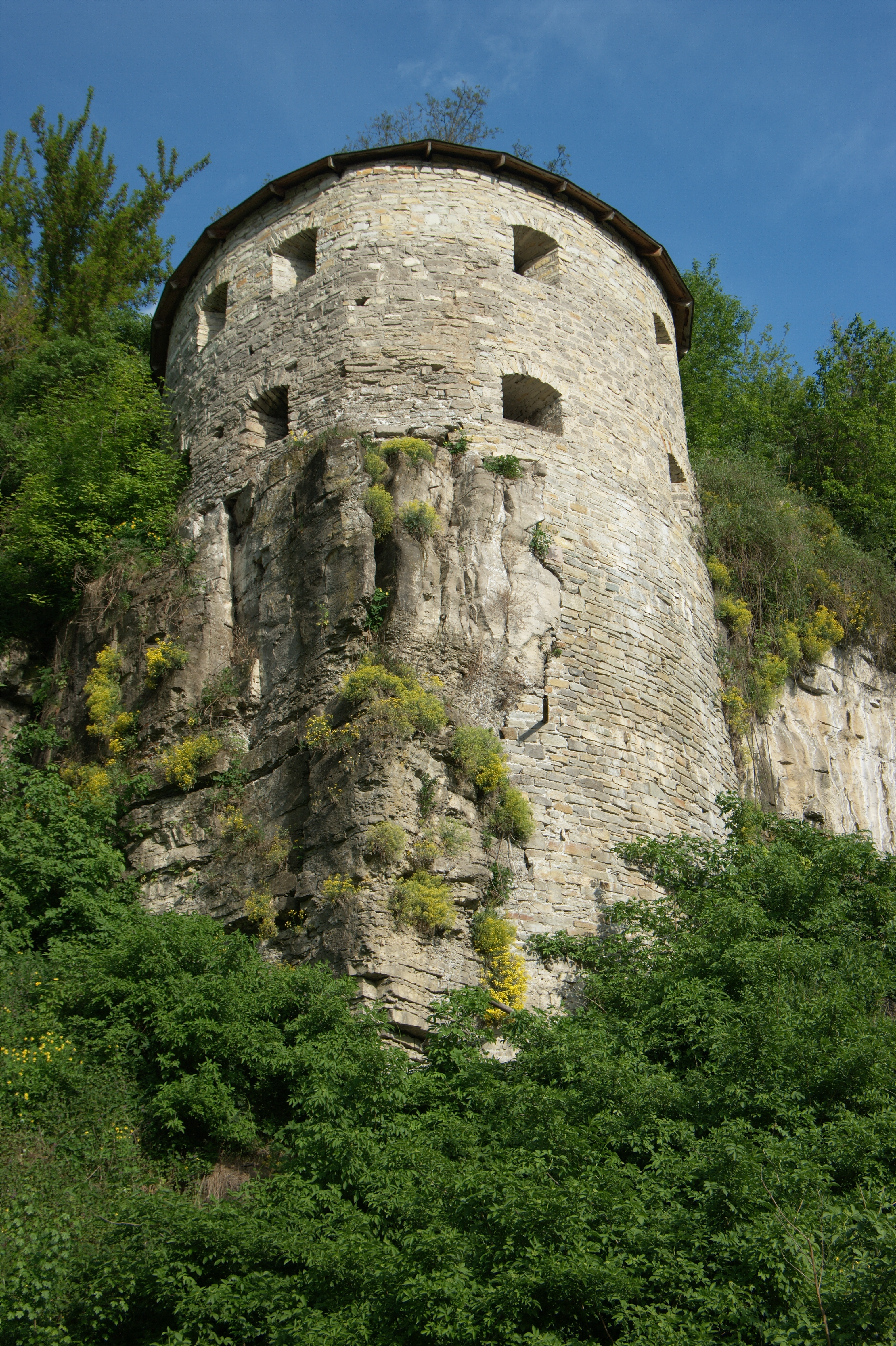 Zakharzhevska tower, Kamianets-Podilskyi